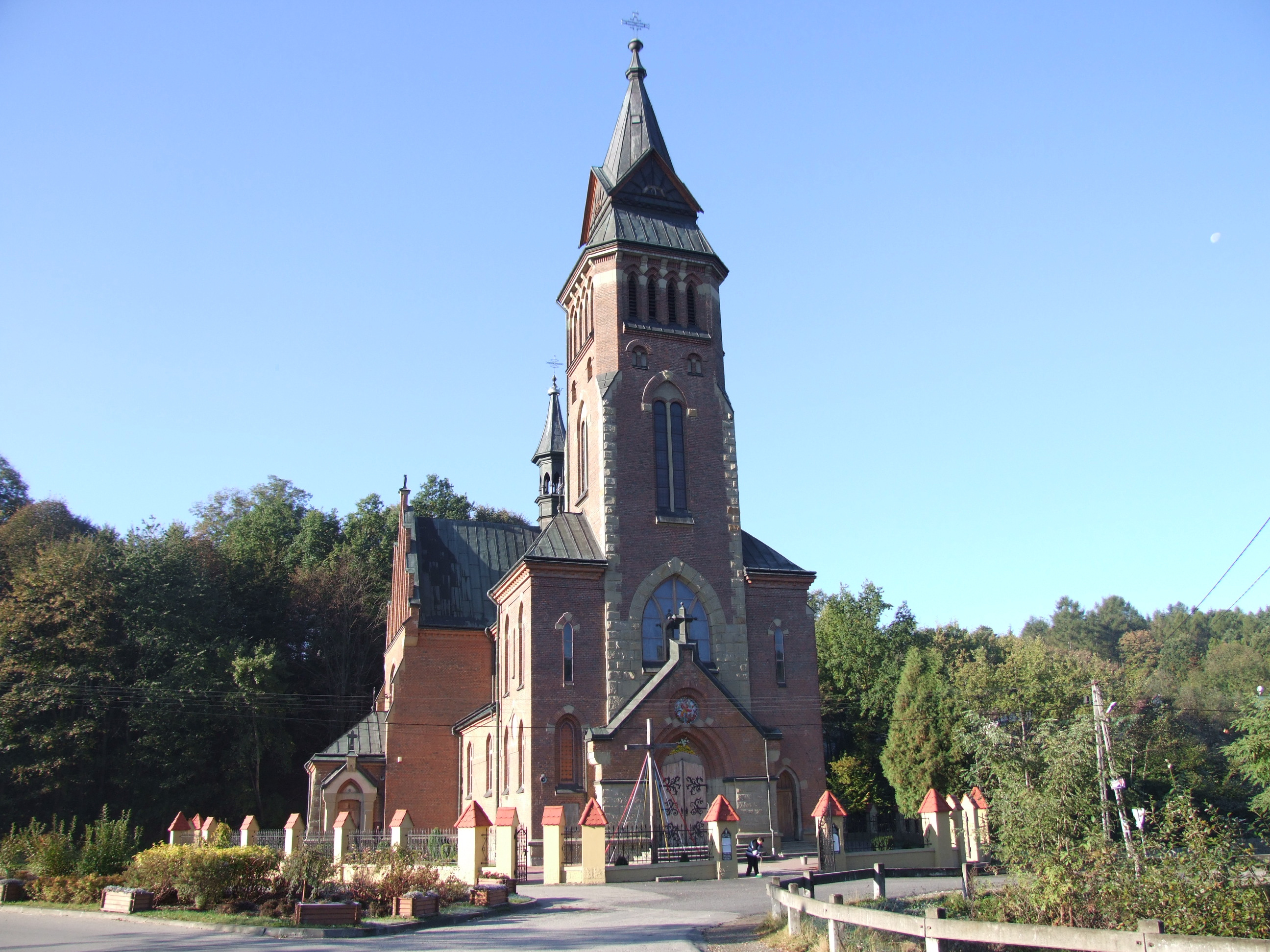 Żeleźnikowa Wielka - neogotycki kościół parafafialny pw. św. Michała Archanioła (zabytek nr A-1278/M z 11.10.2011)